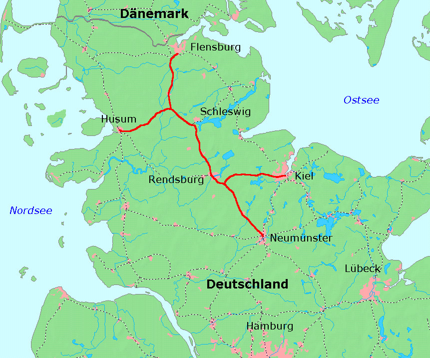 Karte der Bahnstrecke Neumünster–Flensburg